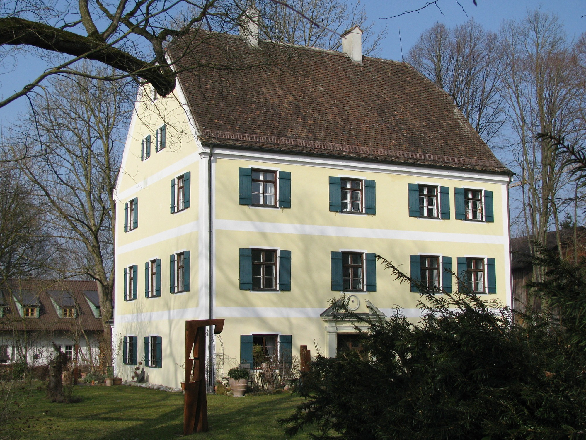 Sog. Unteres Schloss in Pähl, dreigeschossiger Bau aus der Mitte des 16. Js., mit barocken Zutaten; Ansicht von Süden.